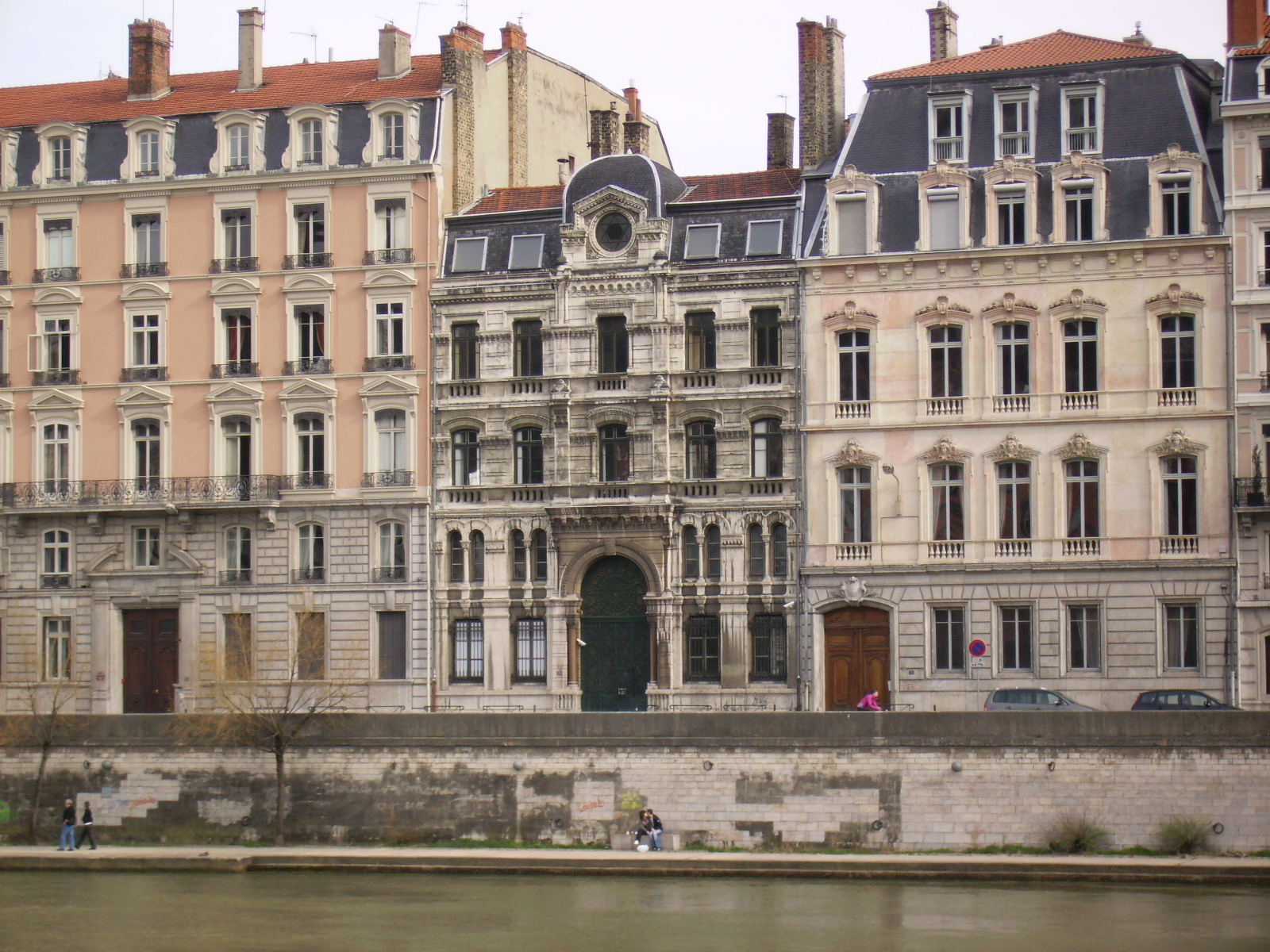 Synagogue Lyon Facade Berge Saone quai Tilsitt Lyon 2e